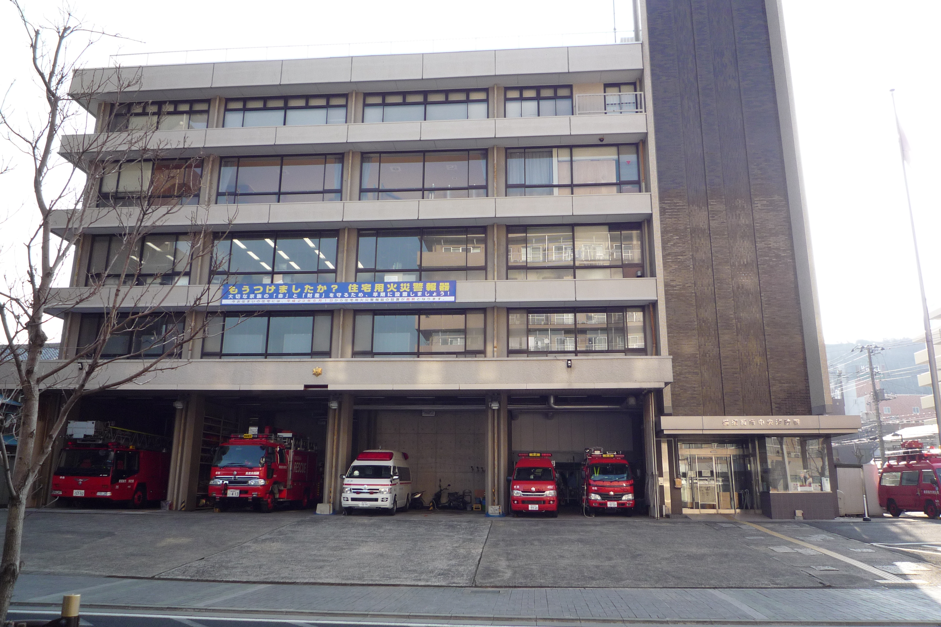 前方から撮影。